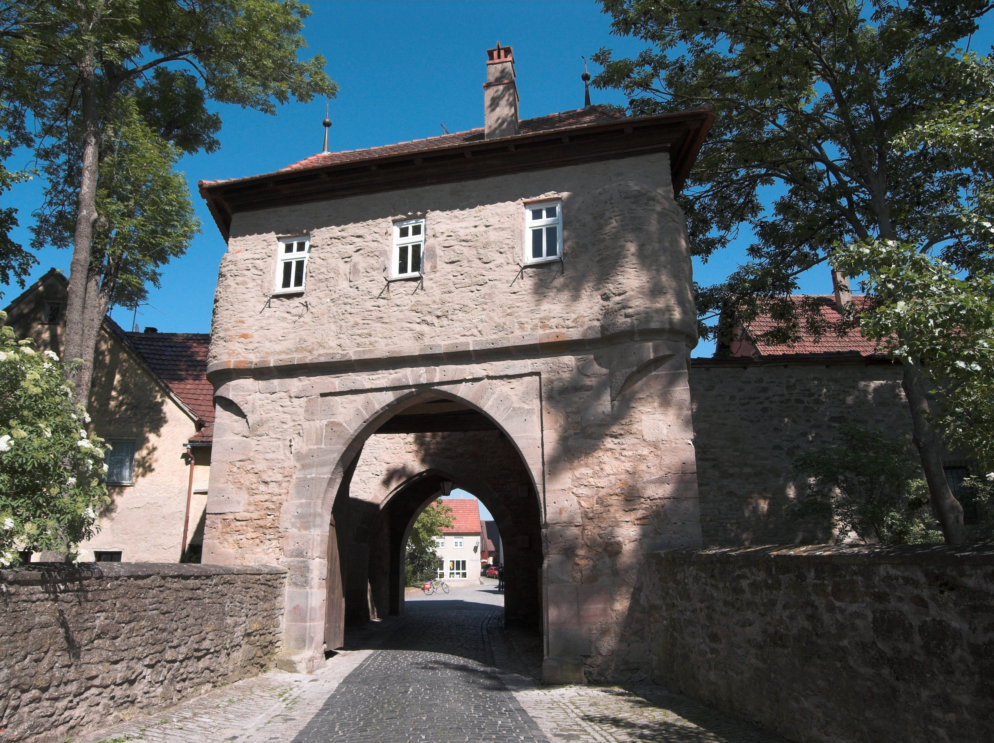 Innere Westseite des Mainbernheimer Tors in Iphofen